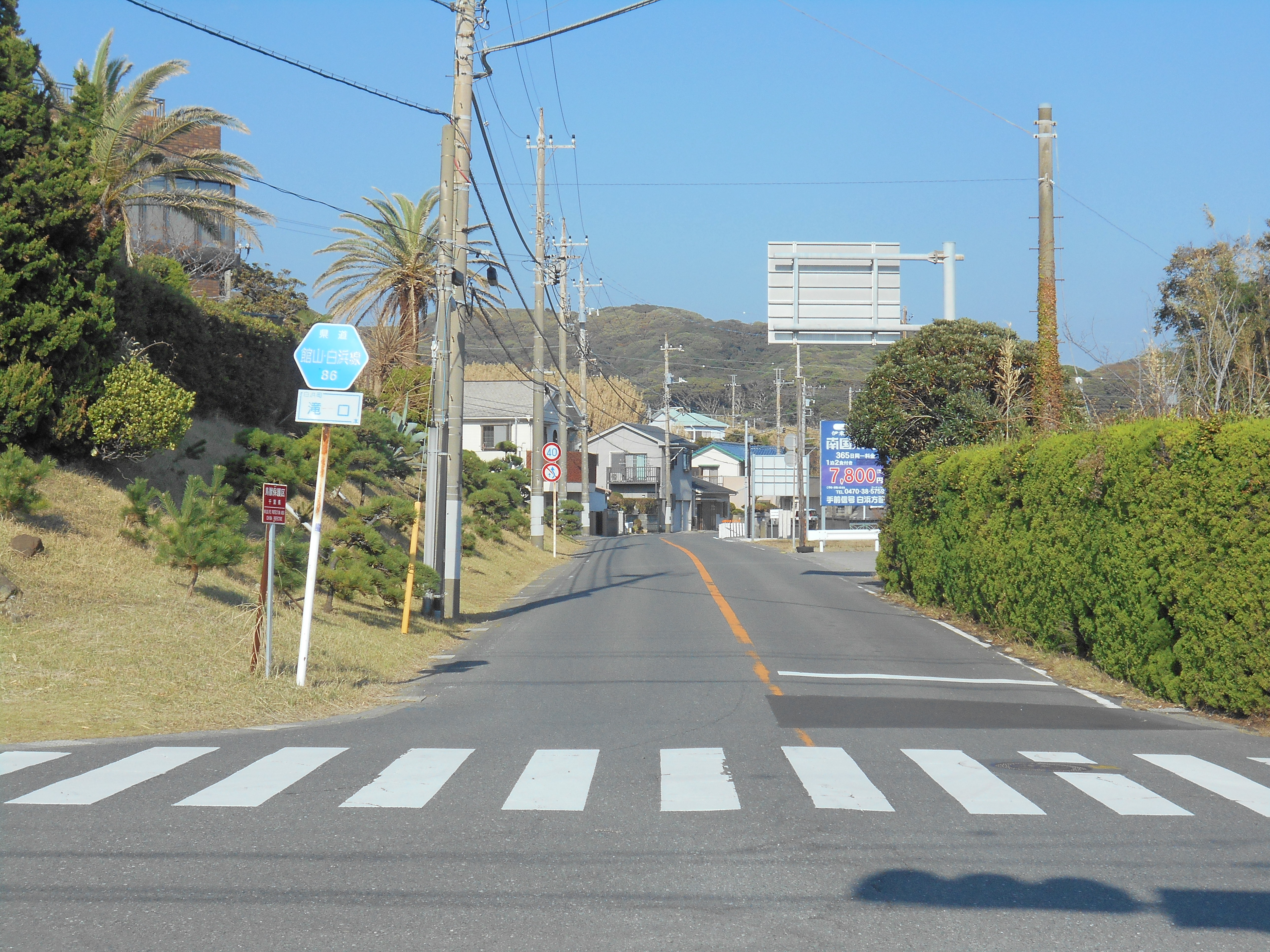 千葉県道86号館山白浜線 (南房総市白浜町滝口)